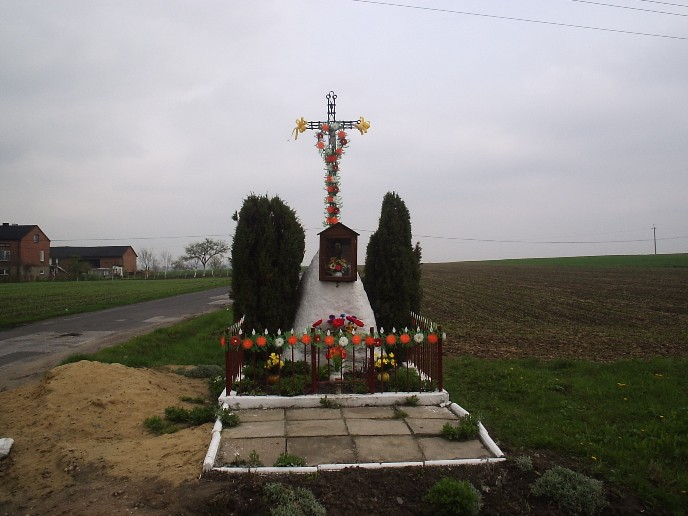 najstarsza kapliczka w Oprzężowie